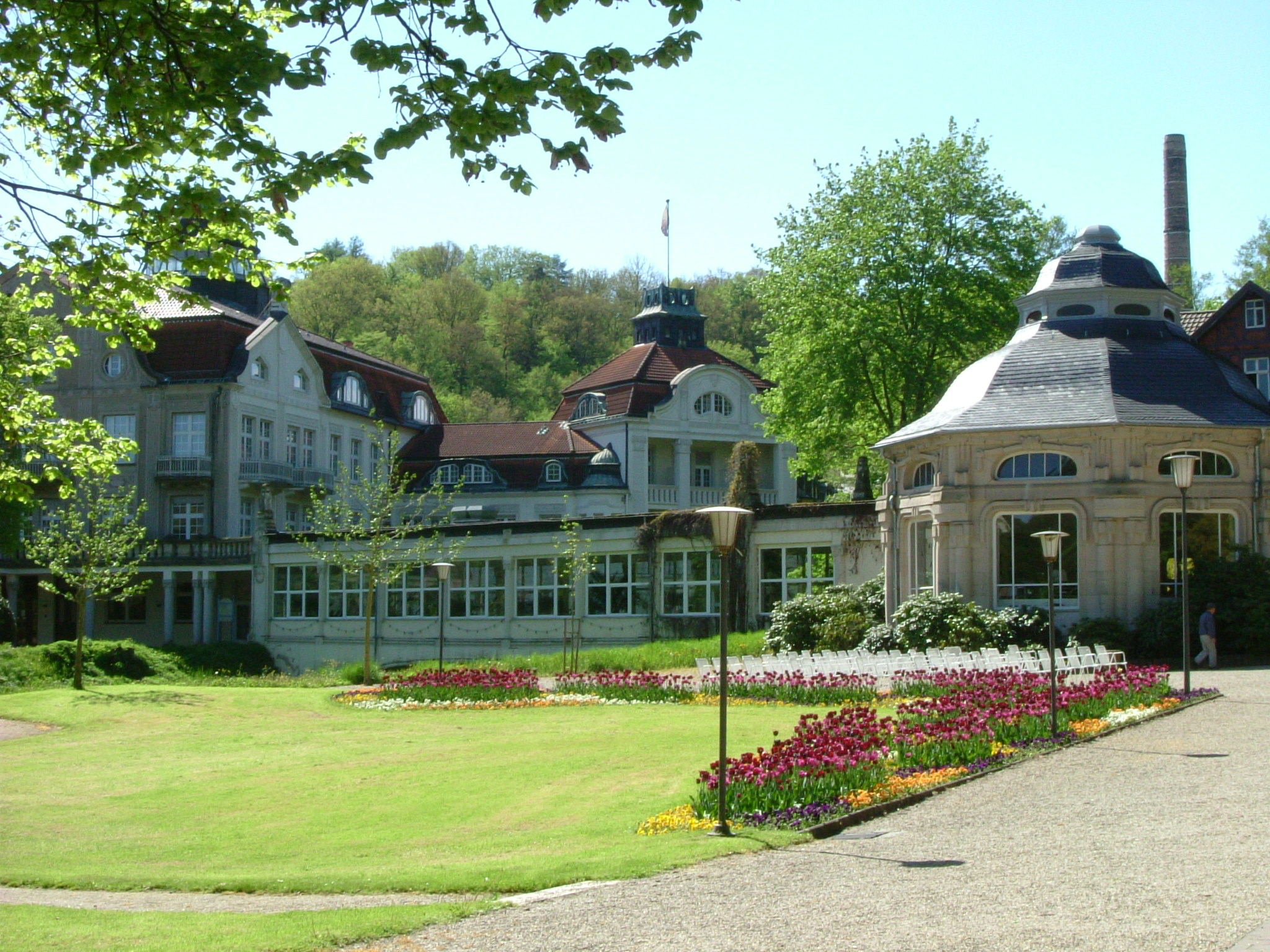 Kurgarten mit Wandelhalle, Bad Salzschlirf (bei Fulda)